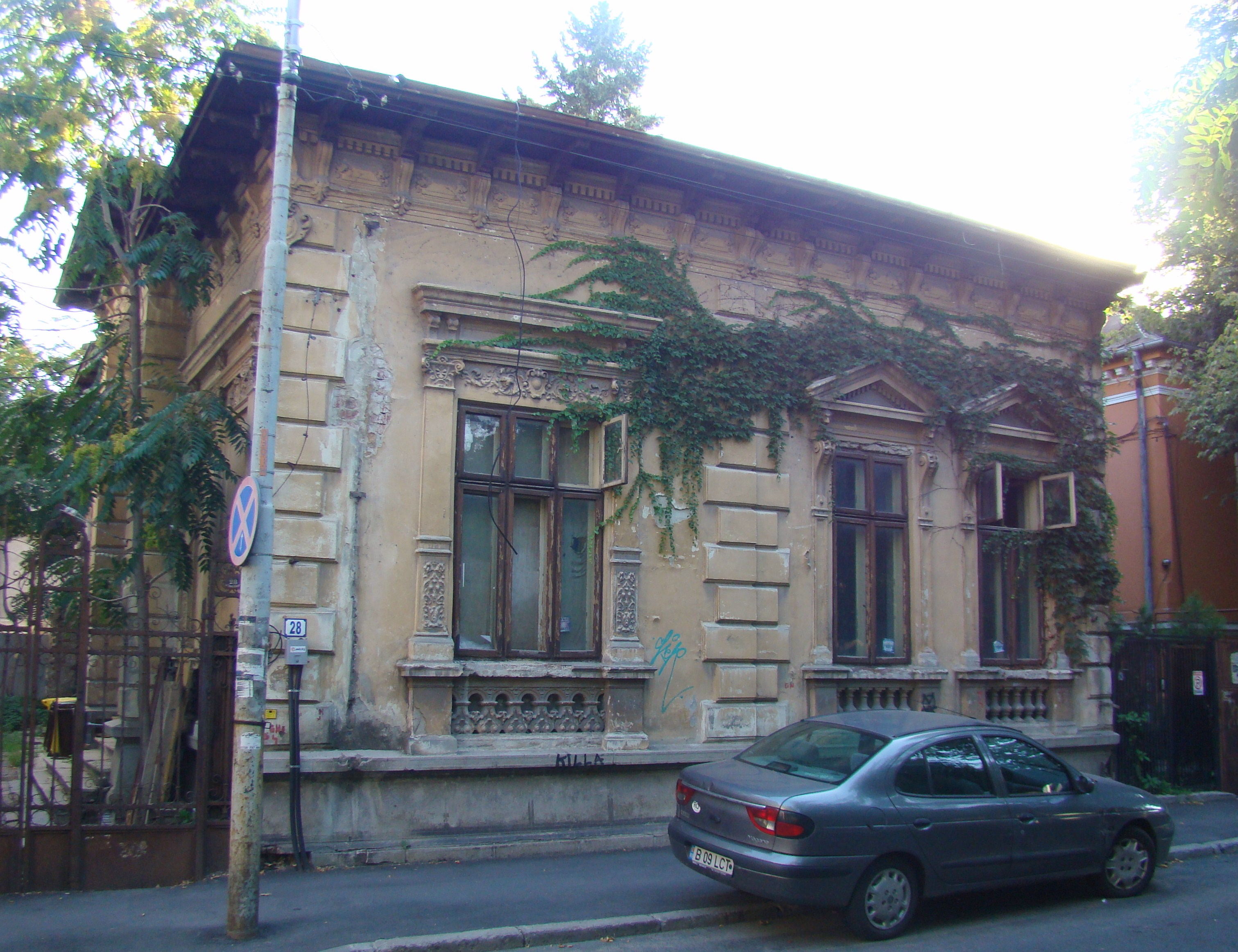 Casă monument istoric, str. Constantin Budișteanu, nr.28